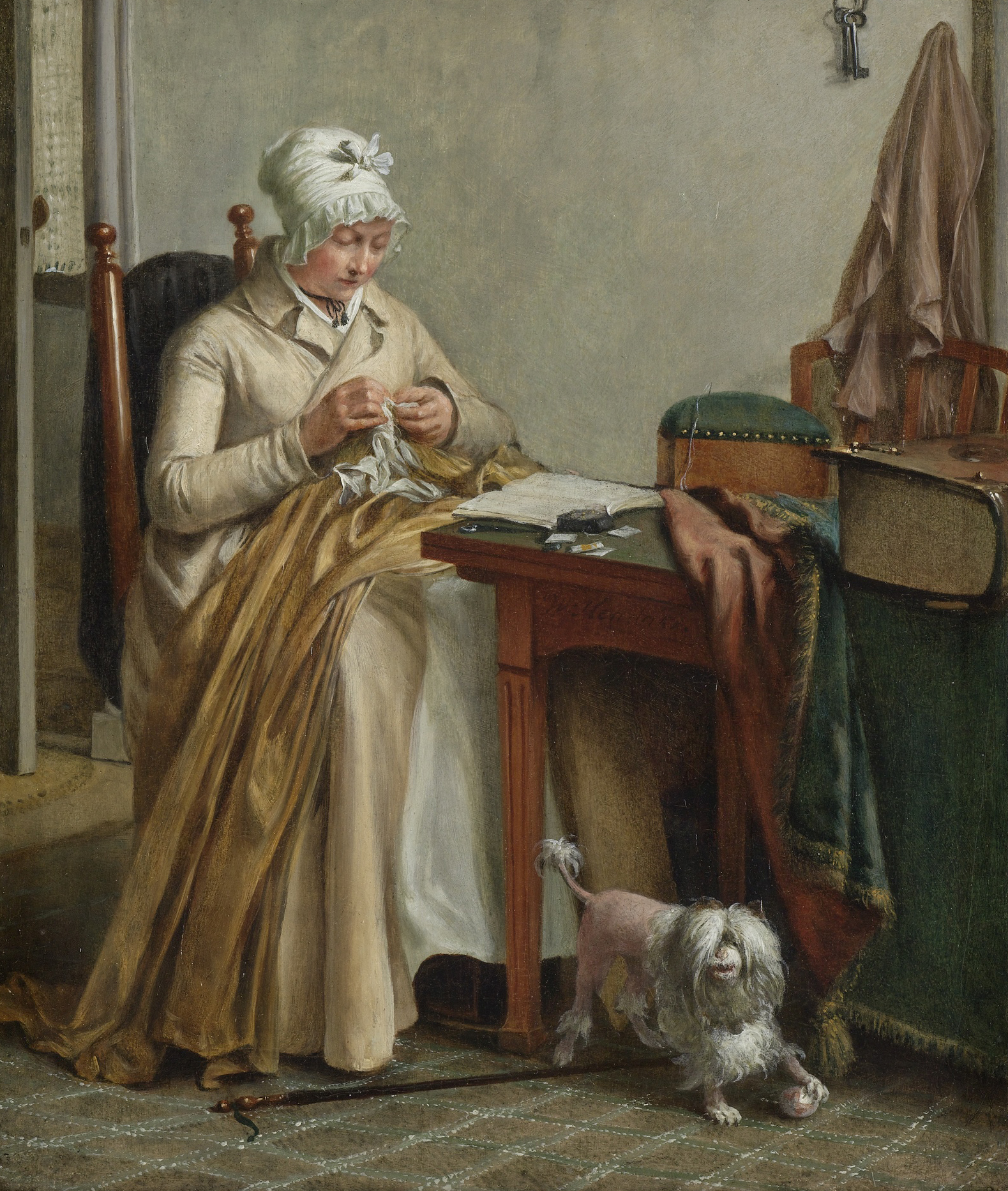 Interieur met naaiende vrouw, gezeten aan een tafeltje waarop een open boek, een teruggeslagen tafelkleed en een statenbijbel. Op de grond ligt en stok en speelt een hond met een kluwen wol.; Wybrand Hendriks (1744-1831), olieverf op paneel, ca. 1800-1810